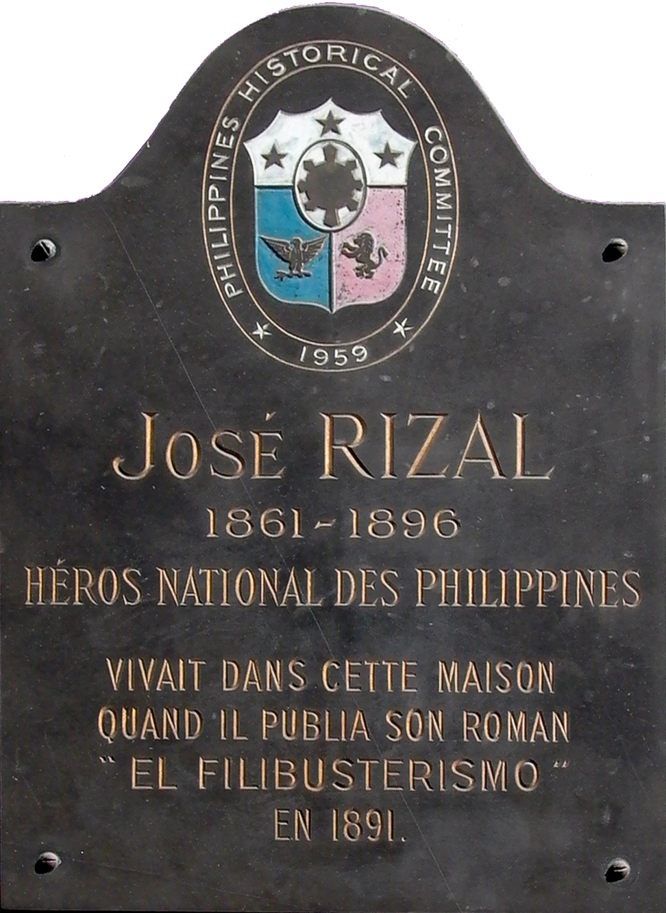 Gedenkplaat José Rizal in Gent